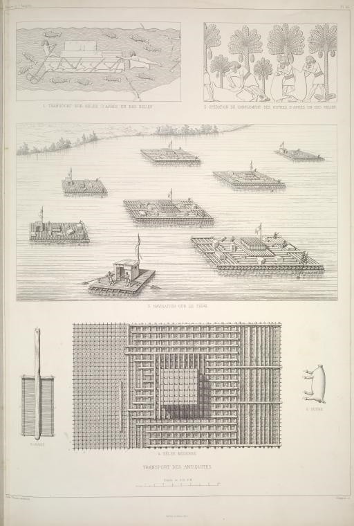 Transport auf dem Wasserweg.1.+2. Transport auf dem Kelek Basreliefs aus Layard:'Monument of Niniveh“. 4-6 Einzelheiten der Konstruktion der Flösse oder Keleks - links Ruder, rechts aufgeblasene Tierhaut